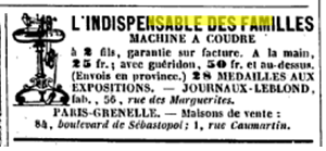 Réclame en dernière page du journal satirique "le journal amusant" parution 1862.